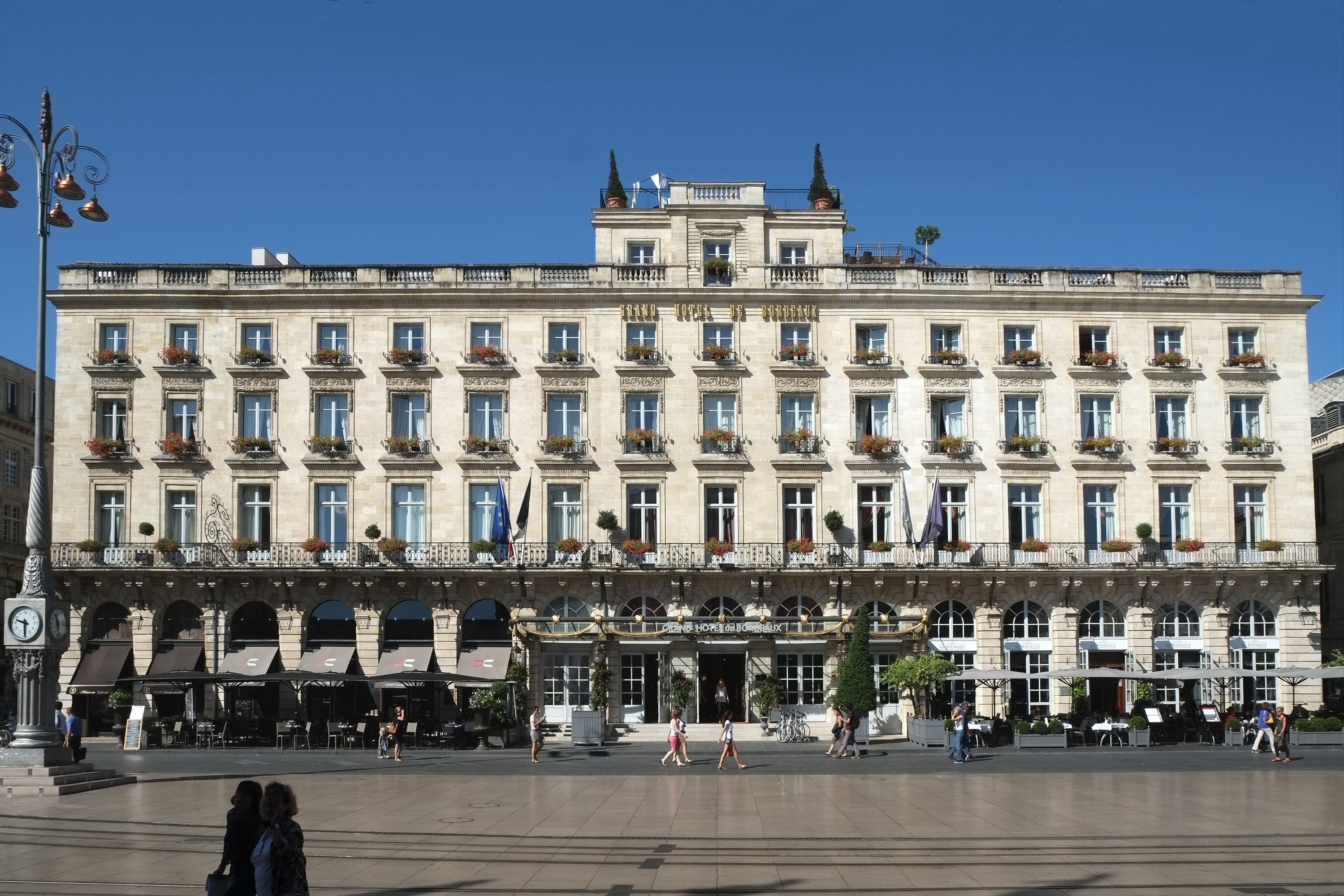 Grand Hôtel Bordeaux Gironde France